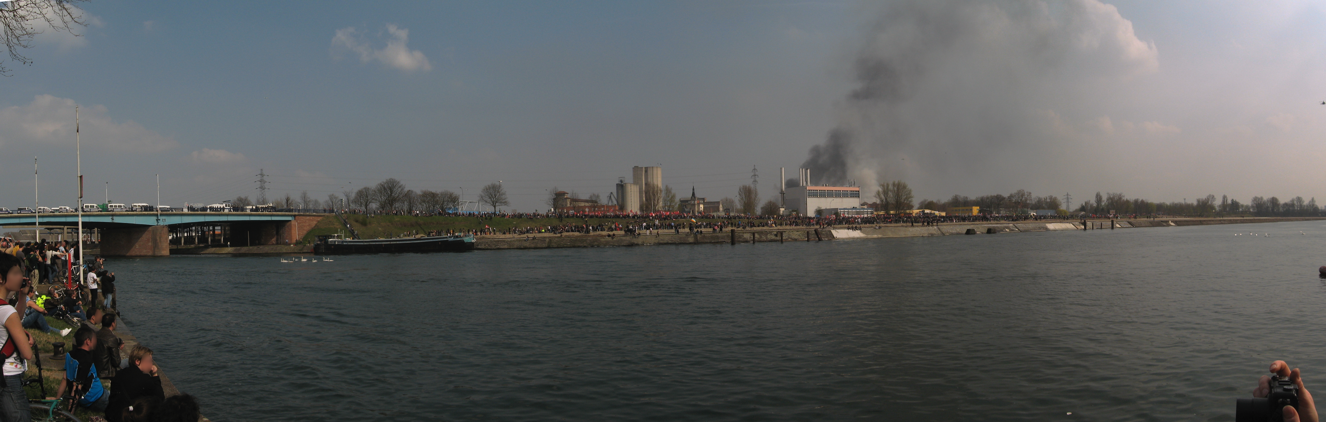 Vue d'une partie de la manifestation anti-OTAN à Strasbourg le 4 avril 2009 depuis le quai des Belges par l'un des milliers de personnes ne pouvant rejoindre la manifestation, le pont d'Anvers (à gauche sur la photo) étant bloqué par la police française et des renforts allemands (canon à eau vert sur le pont d'Anvers). Au centre droit, de la fumée s'élève de l'un des bâtiments incendiés.